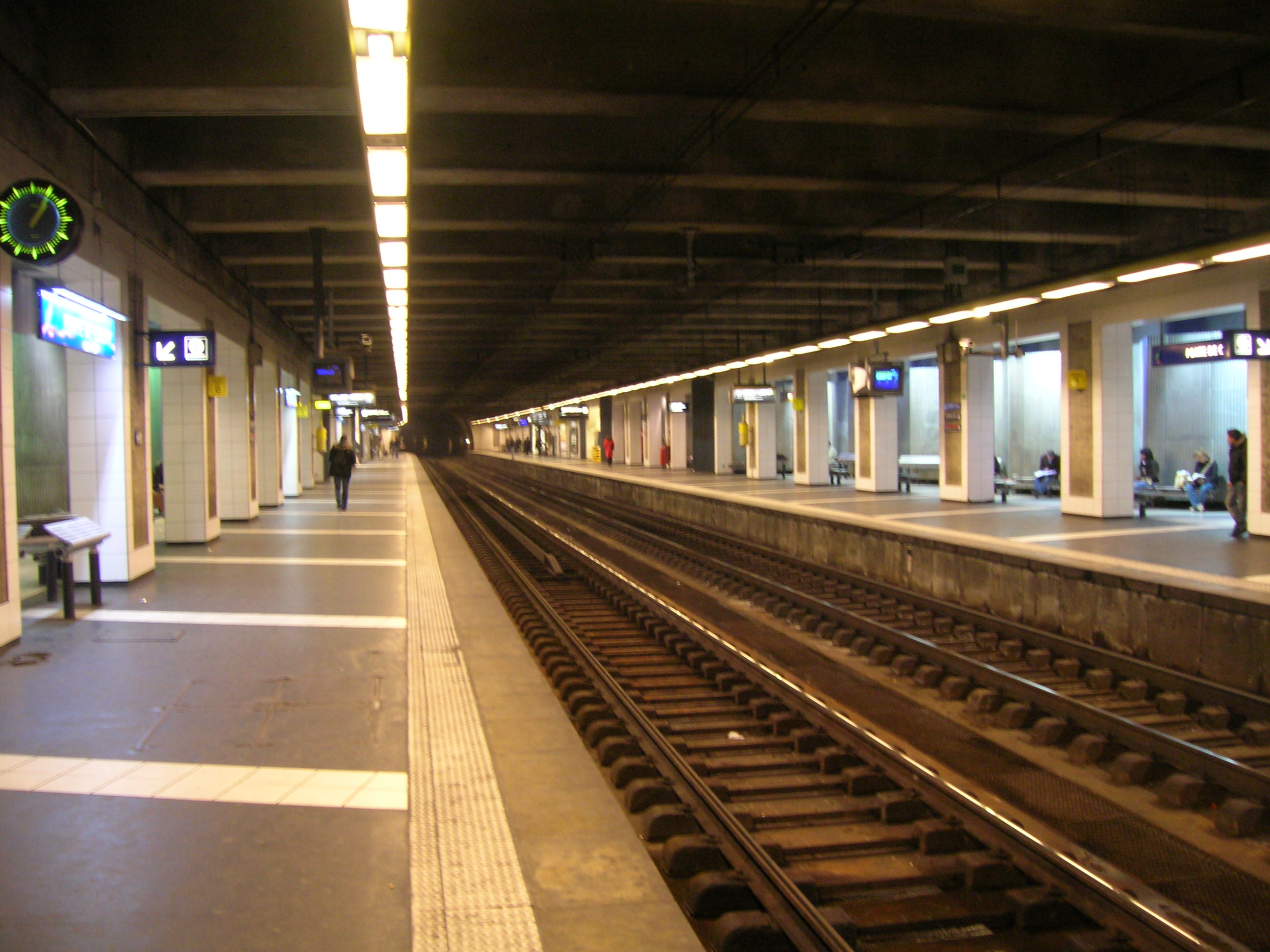 Station Porte de Clichy du RER C, niveau quais, Paris 17e, France